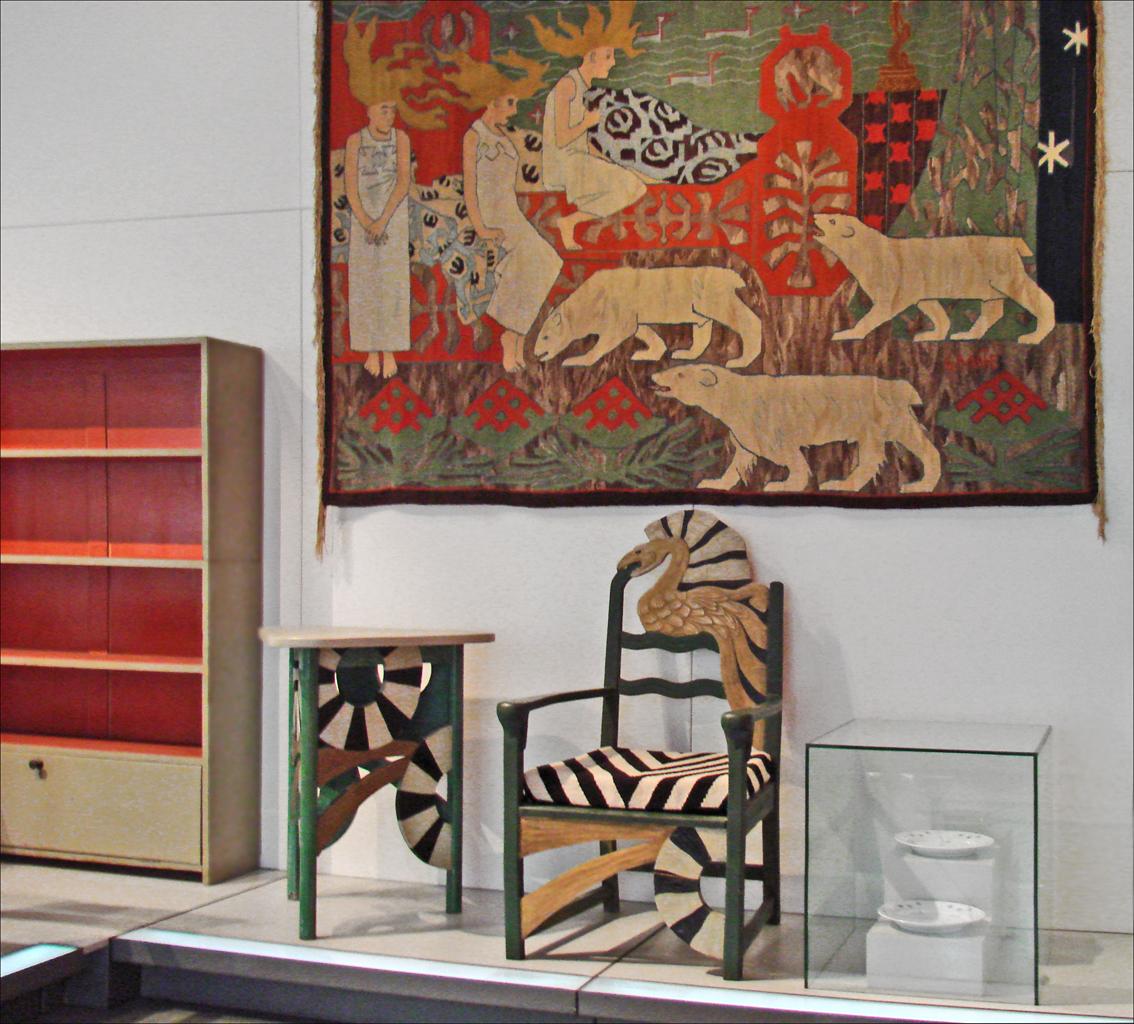 Oeuvres de Gerhard Munthe Au mur, tapisserie de G. Munthe : "Wooers" / "Daughters of the Northern Lights," 1897 voir aussi : Chaise et table de G. Munthe, 1896-1898 réalisées par Johan Borgersens A droite, deux assiettes en porcelaine, 1892-1893 Notice de Wikipedia sur Gerhard Munthe Le musée d'Art industriel fait partie du musée national d'Art, d'Architecture et de Design. Il expose de l'artisanat, de la mode et du design norvégiens et étrangers du 7e siècle à nos jours. Le musée abrite notamment la plus belle collection de Norvège de tapisseries des 16e et 17e siècles et de riches collections d'argenterie, verrerie, céramique et meubles. Il possède un département sur l'art d'Extrême-Orient et une Galerie royale de costumes (incluant la garde-robe royale, qui présente les robes des reines de Norvège depuis la Reine Maud)